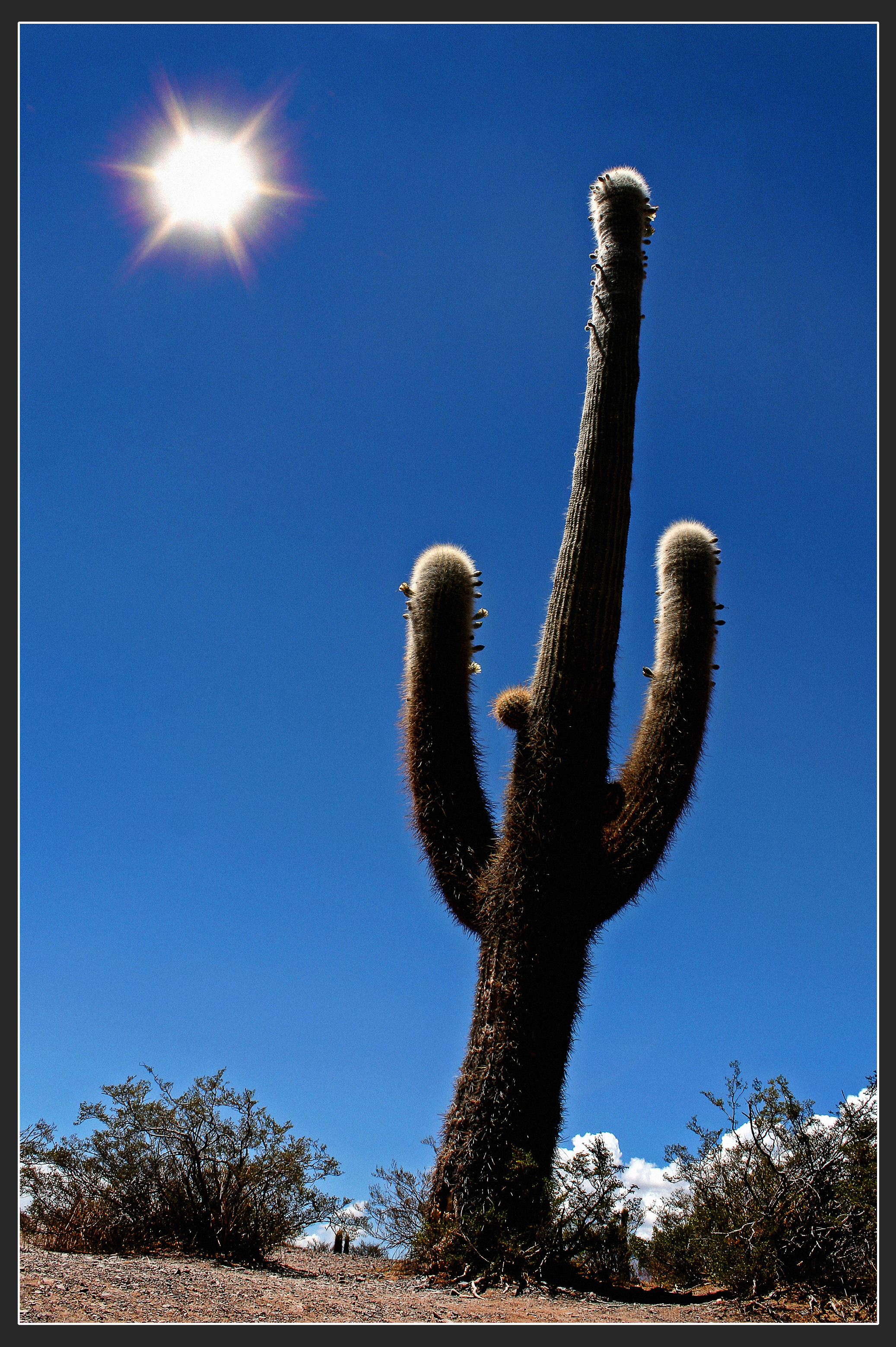 Cardon de camino a las Salinas Grandes